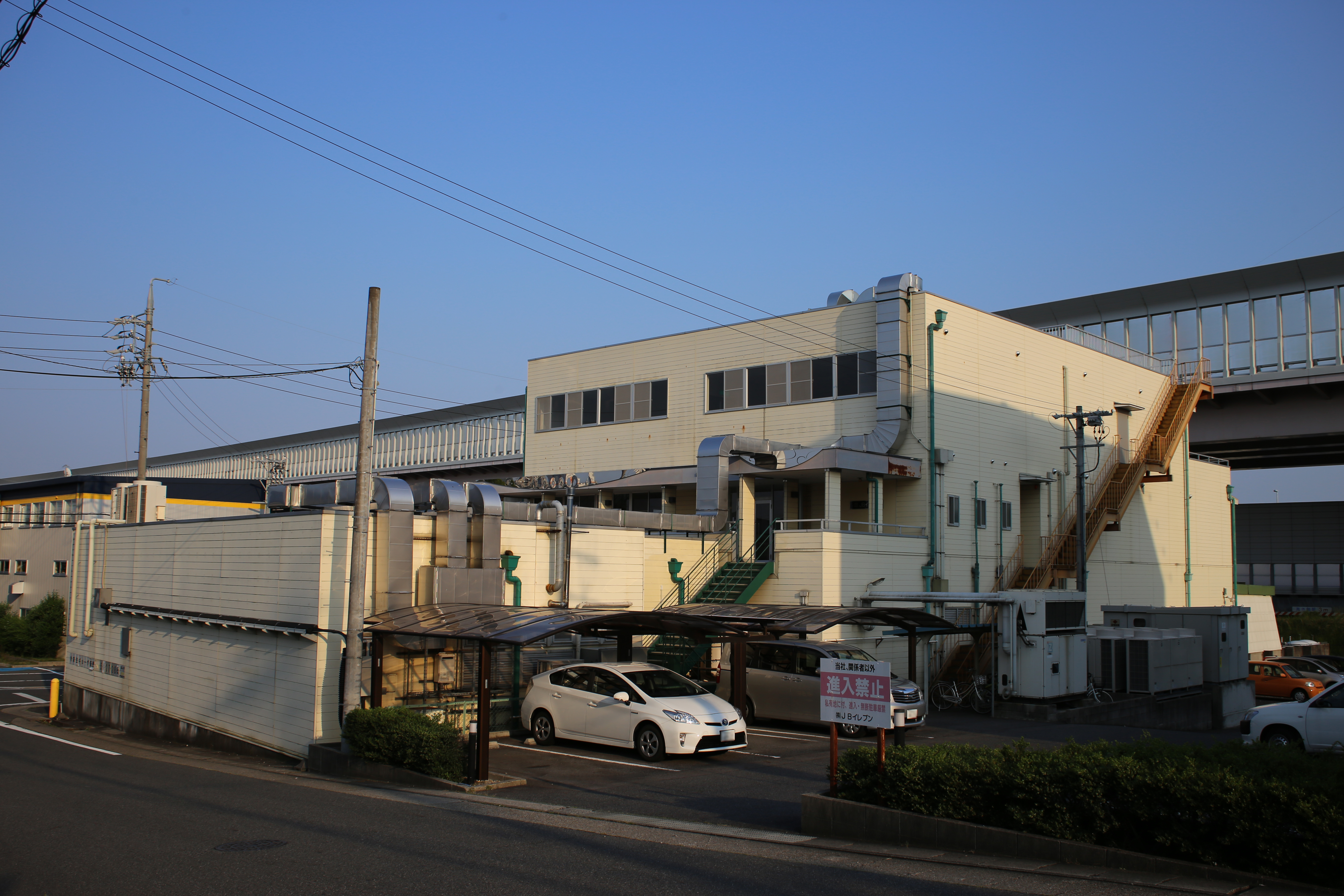 名古屋市緑区桶狭間切戸のJBイレブン本社を北側公道西側より撮影。ただし、ナンバープレートにつき画像処理済。